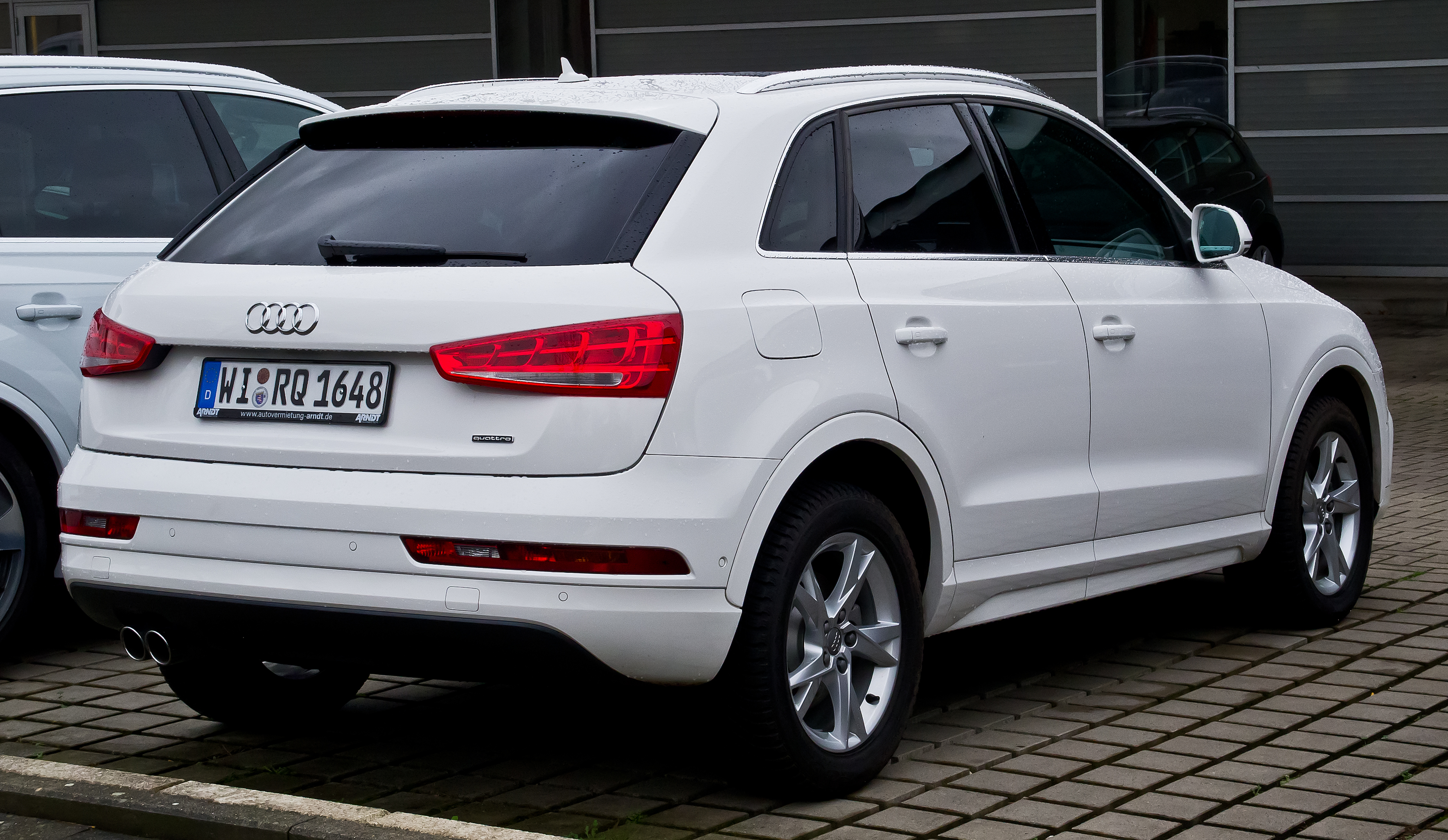 Audi Q3 quattro Sport (Facelift)